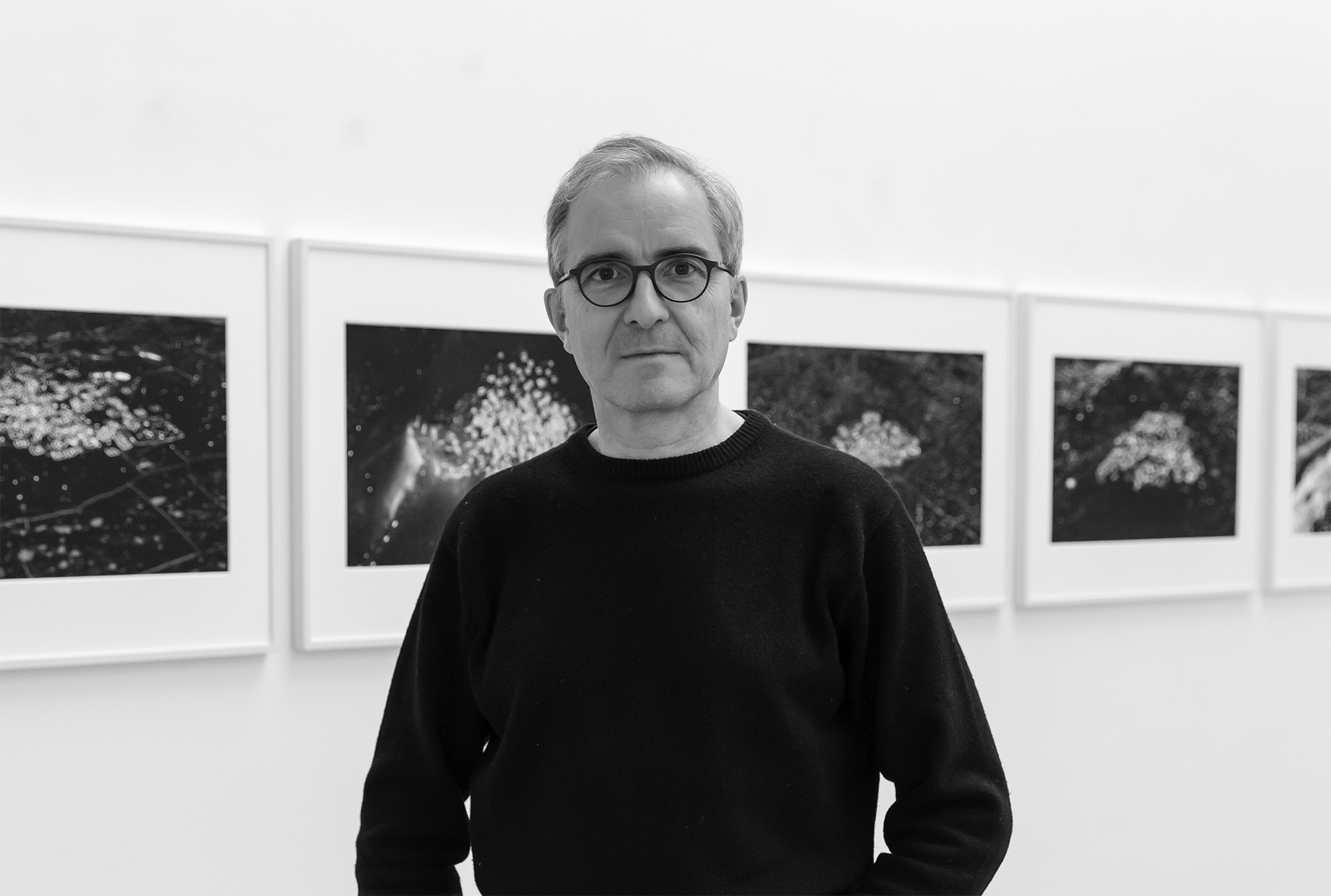 Lors de l'exposition en 2015 à la Galerie Esther Woerdehoff, Paris